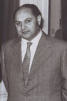 Gustavo Lorca, Humberto Aguirre Doolan, Eduardo Frei y Luis Pareto; políticos chilenos